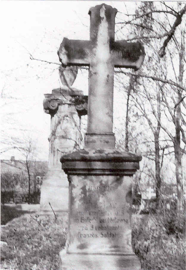 Grab des Michael Kaup (eigene Arbeit)